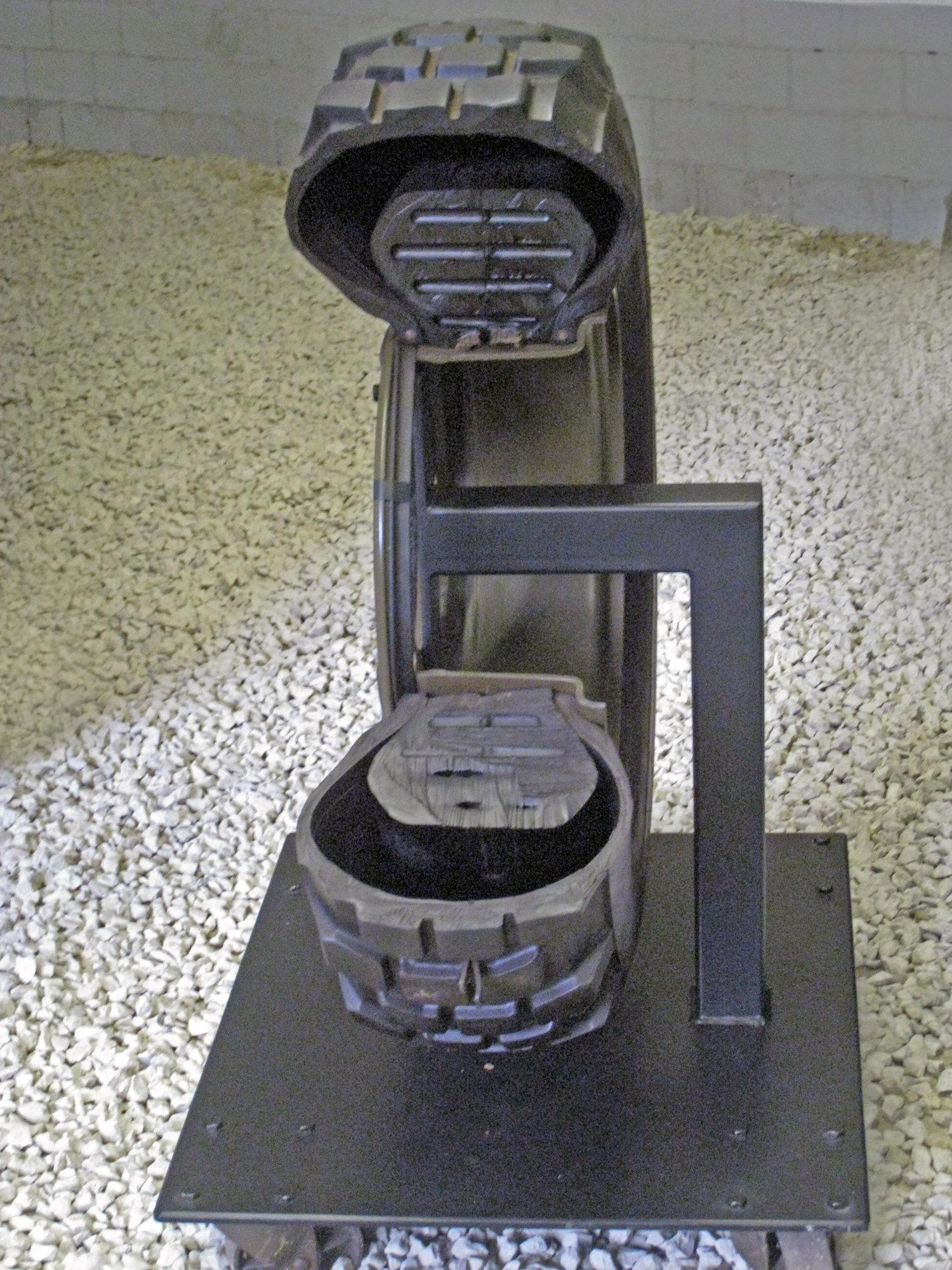 aufgeschnittener Piranha-Pneu